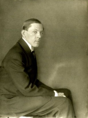 Václav Vilém Štech, český historik umění, teoretik, kritik a publicista, profesor Akademie výtvarných umění v Praze